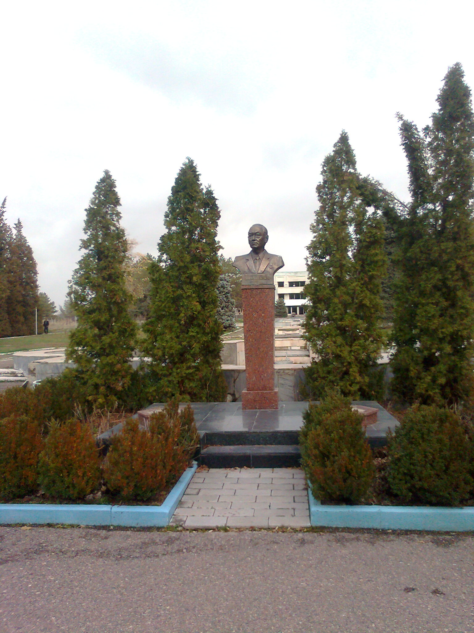 Бюст Махмуда Мирзаева в Ташкенте. Узбекский научно-исследовательский институт Садоводства, виноградарства и виноделия имени М.Мирзаева (бывший Институт Р.Р.Шредера)